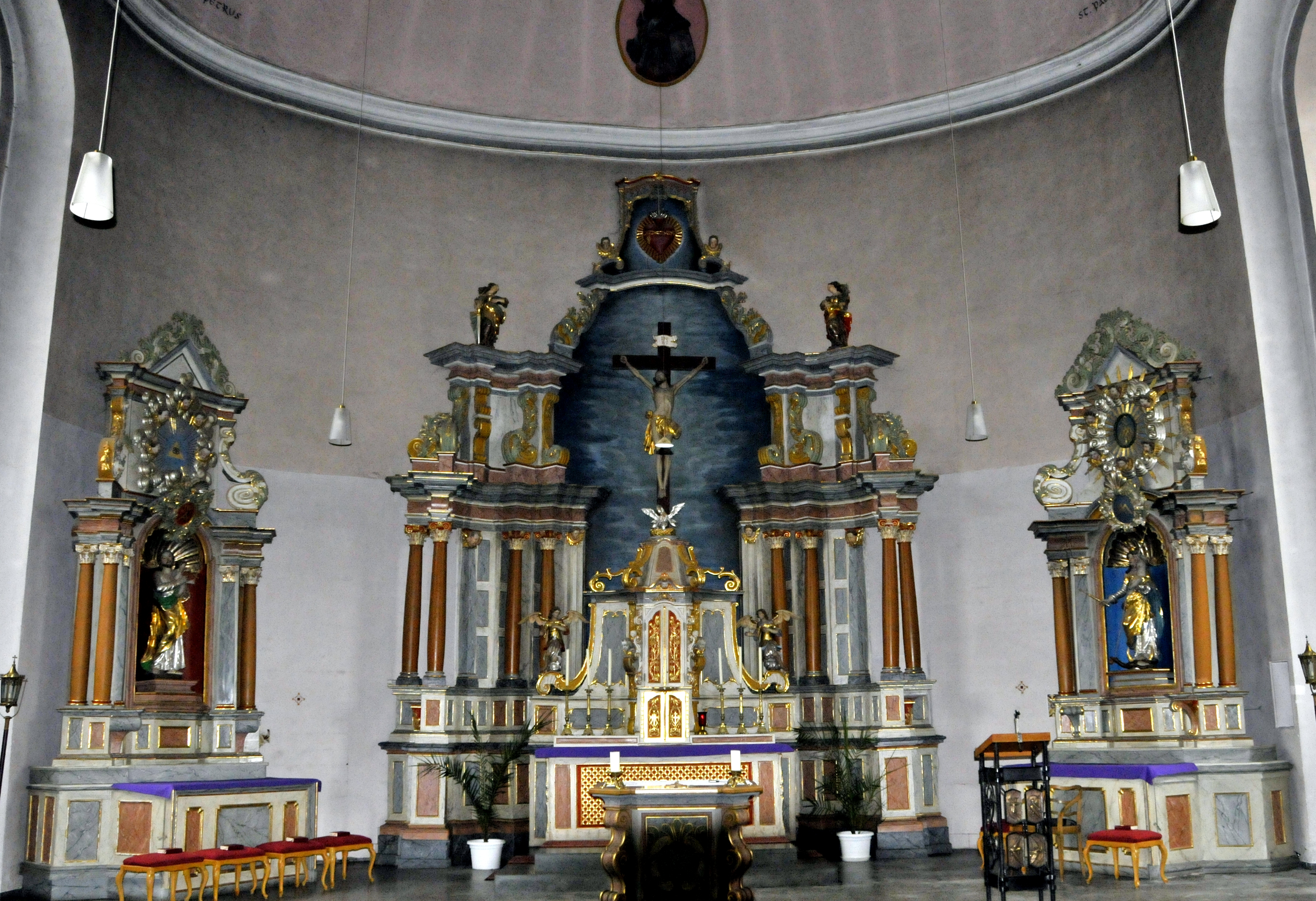 Trittenheim, Kirche, Altarraum